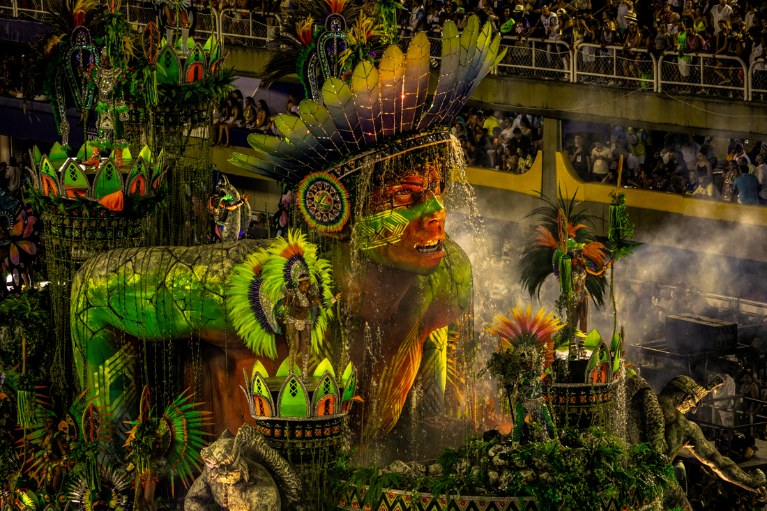 Magie du Carnaval - Rio de Janeiro